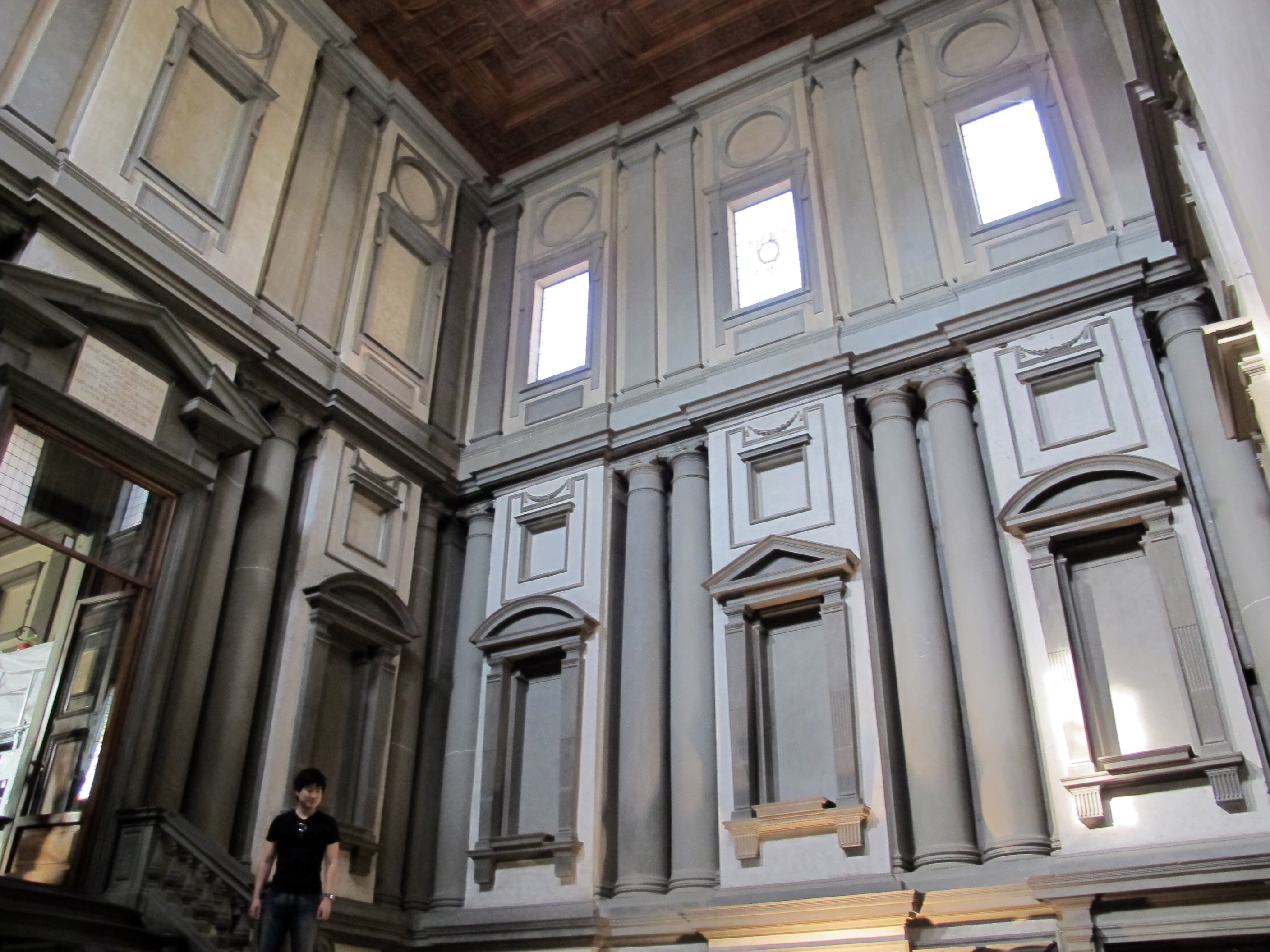 Biblioteca laurenziana, vestibolo